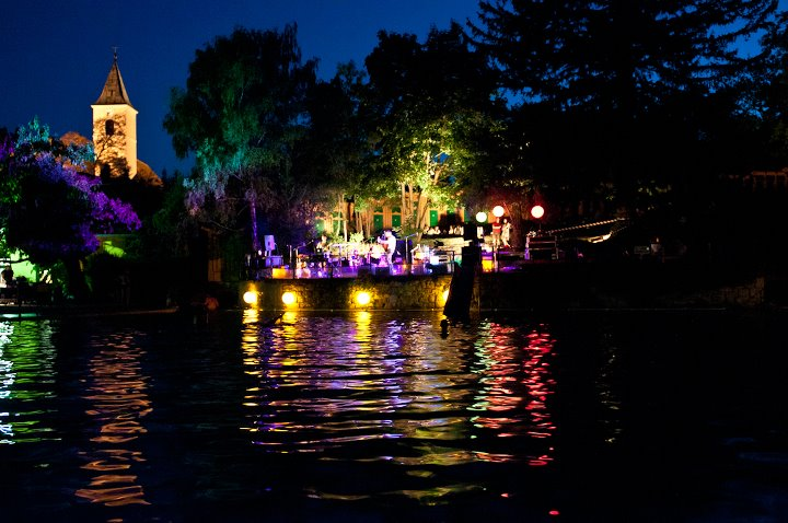 fm5 Klangbad Sujetfoto